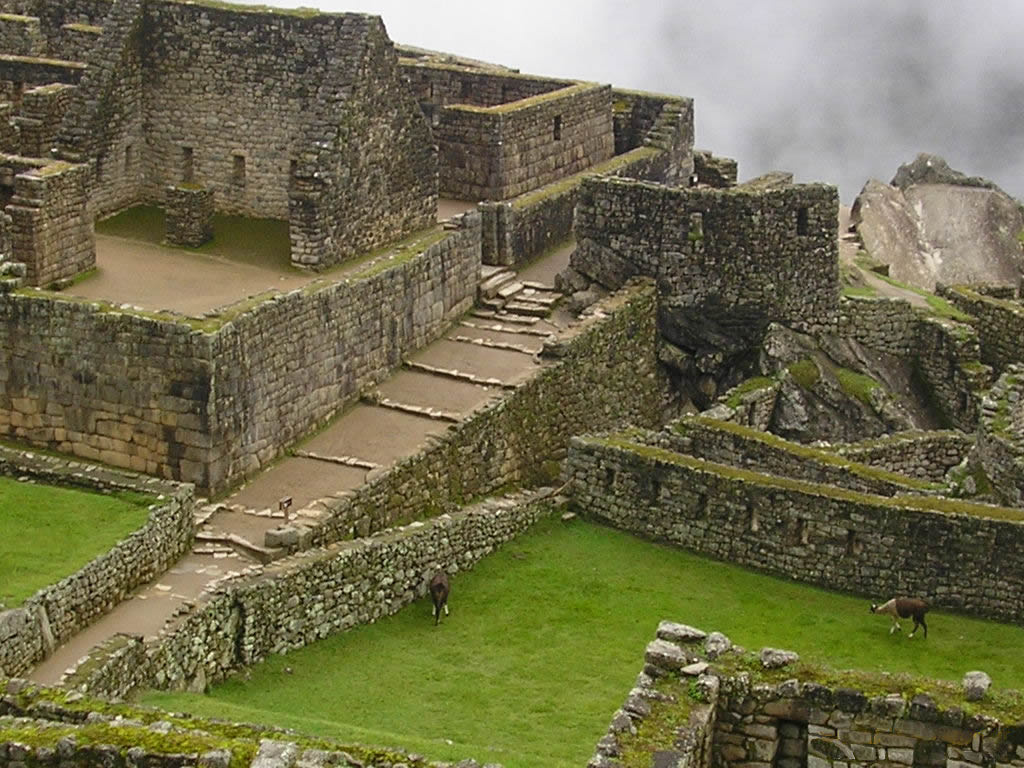 Machu Picchu